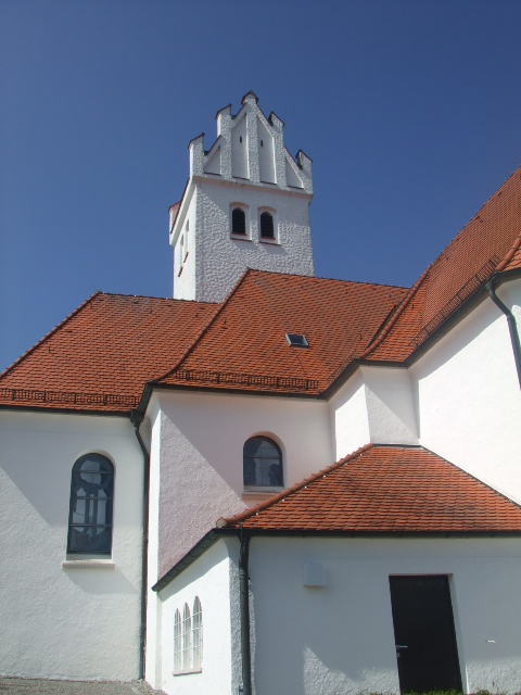 Kirche St. Peter und Paul, Kappel, Stadt Bad Buchau, Landkreis Biberach Außenansicht